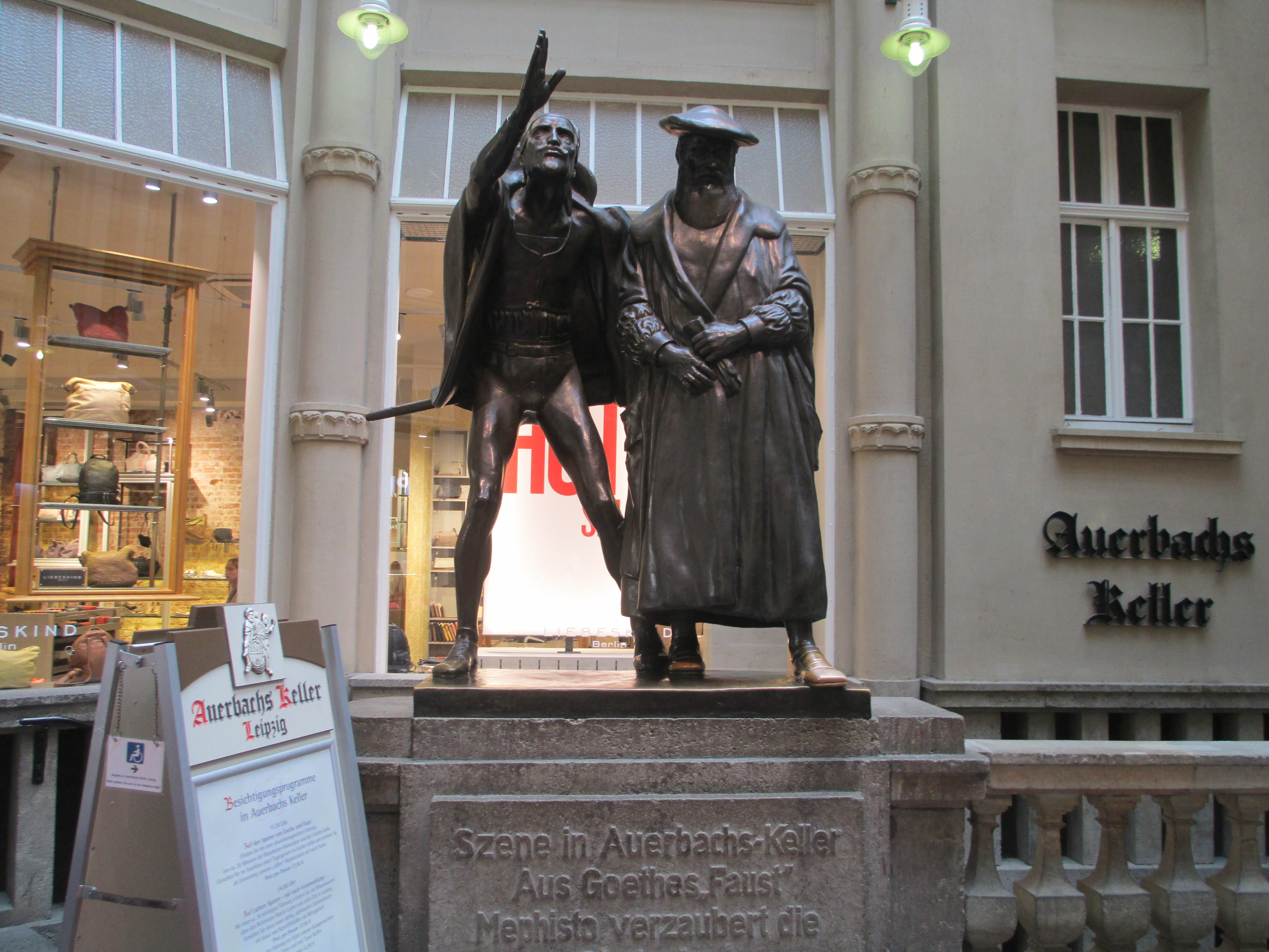 פסל מפיסטופלס (מפיסטו) ופאוסט במרתף אאורבך בלייפציג